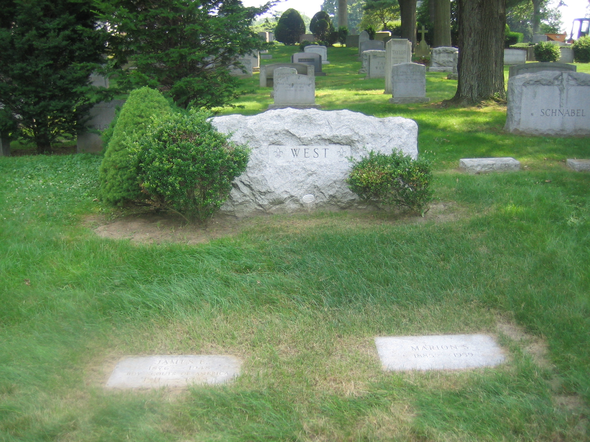 James E. West grave